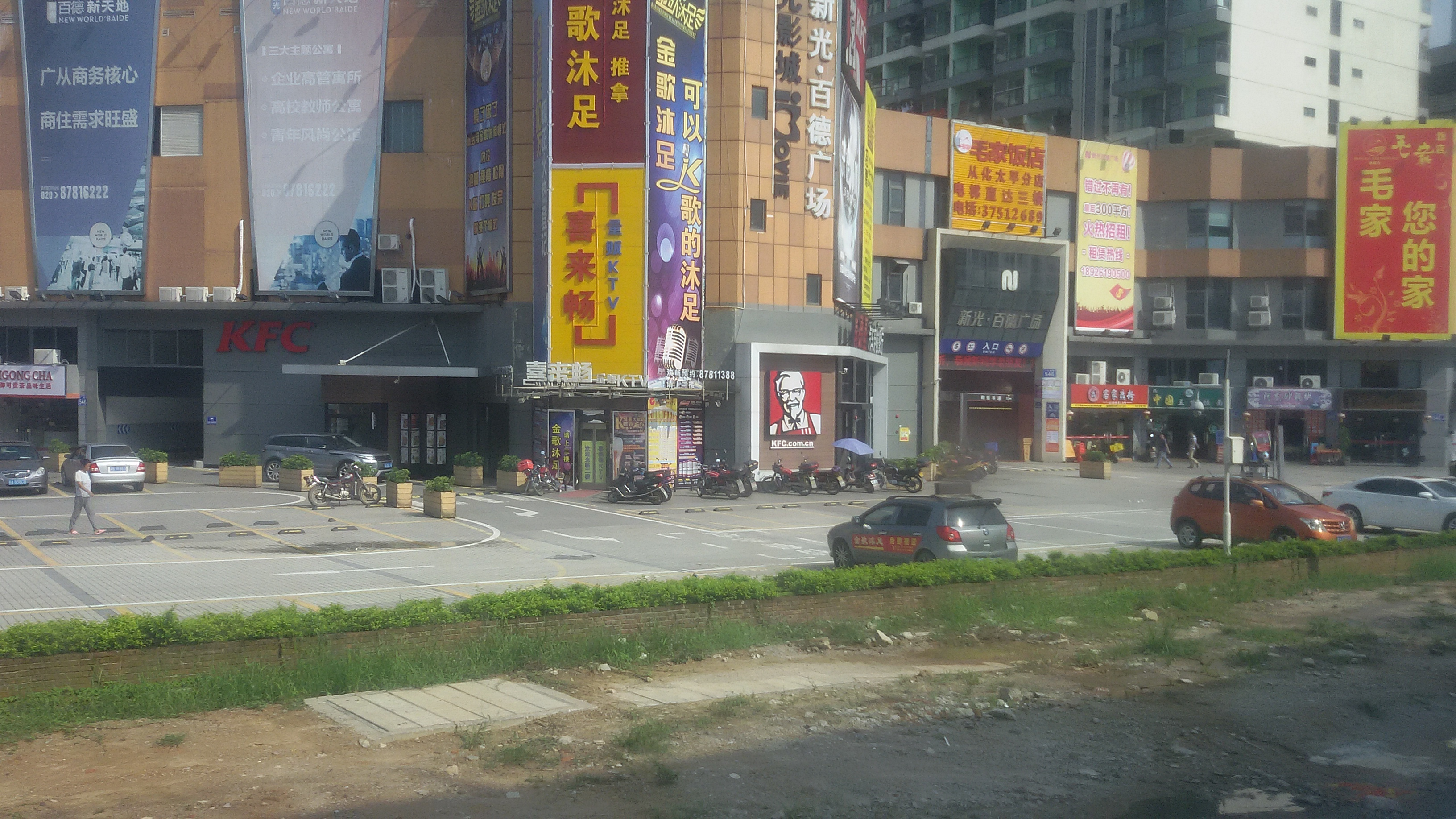 粵語: 新光·百德廣場